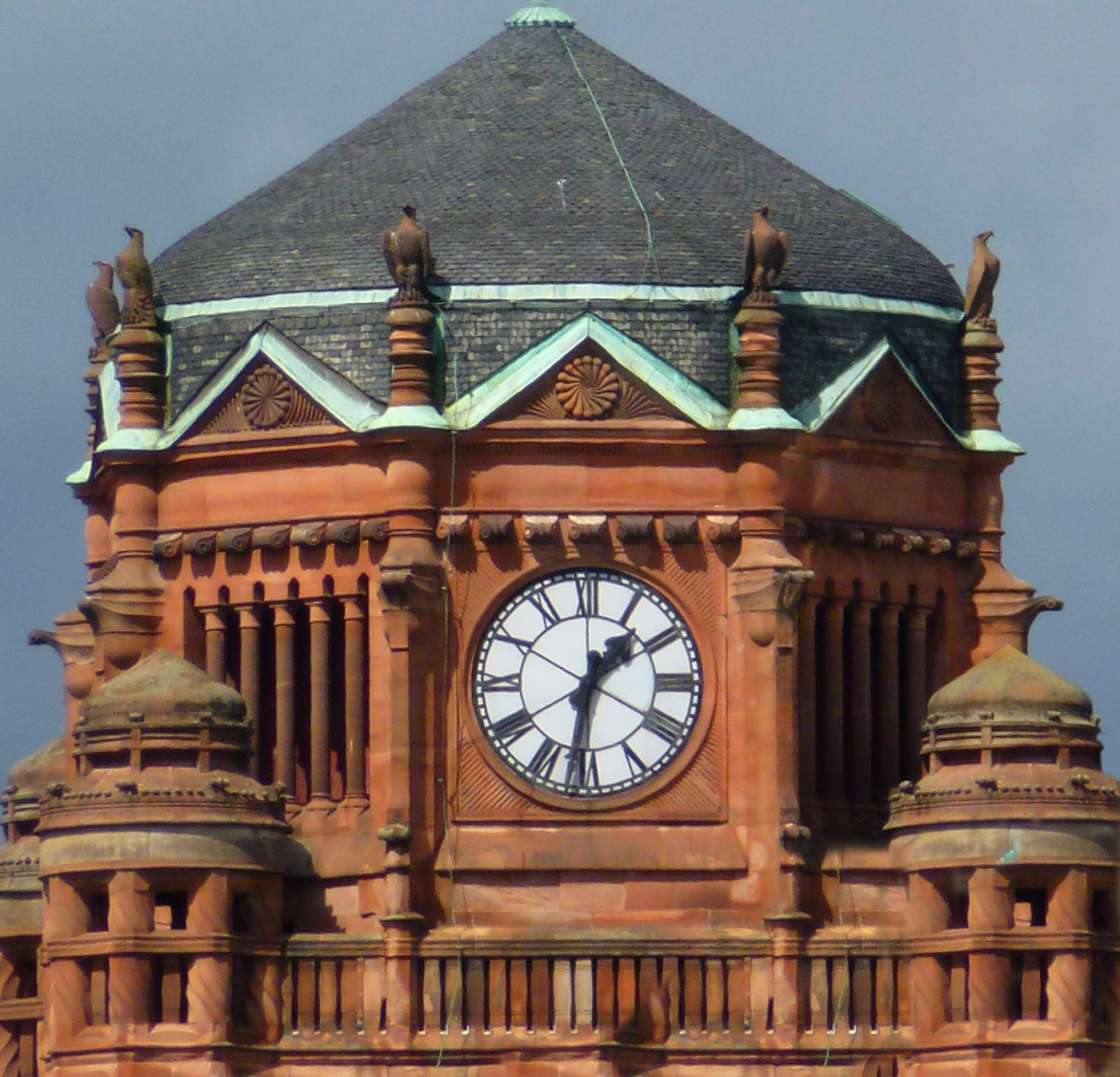 Centralpostens torn och klocka